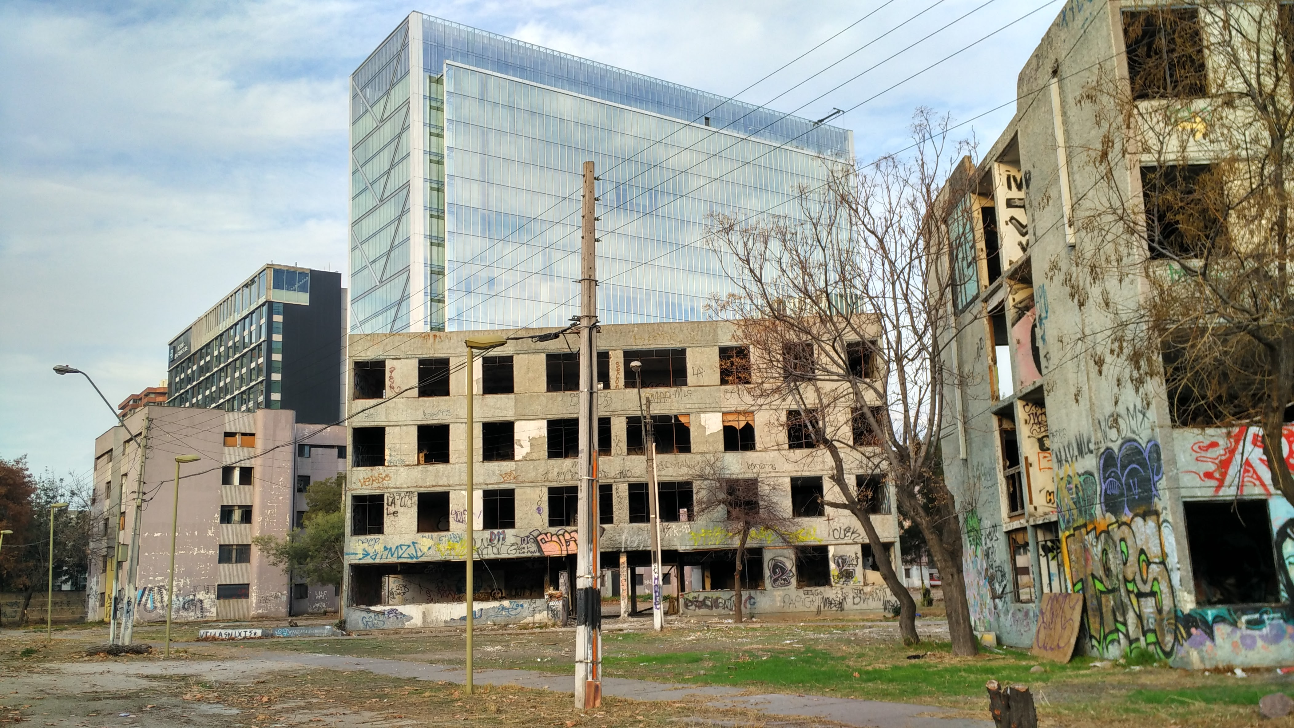 Fotografía de la villa San Luis